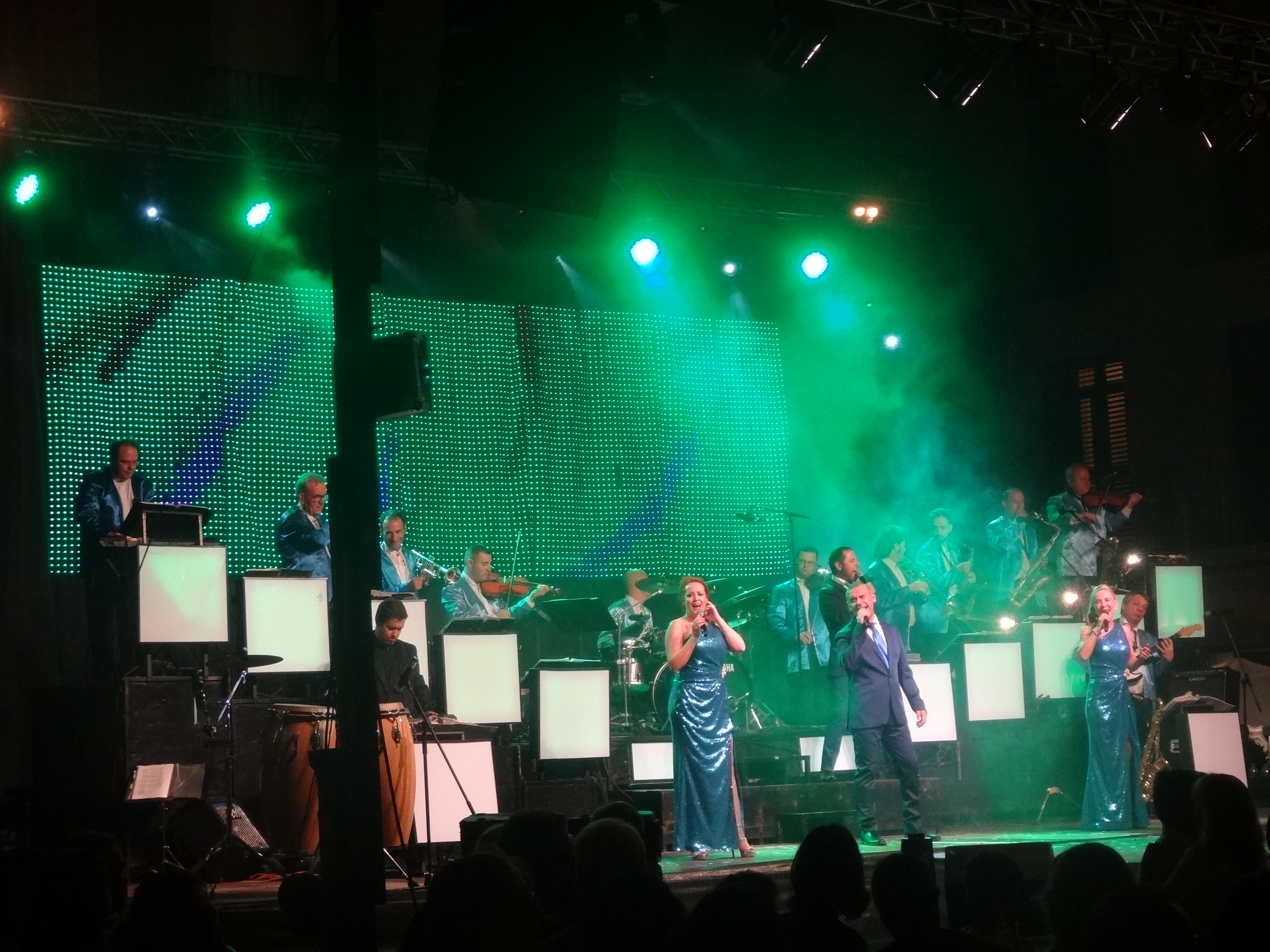 Festa Major d'Igualada, agost de 2016. Orquestra Maravella a la plaça de l'Ajuntament